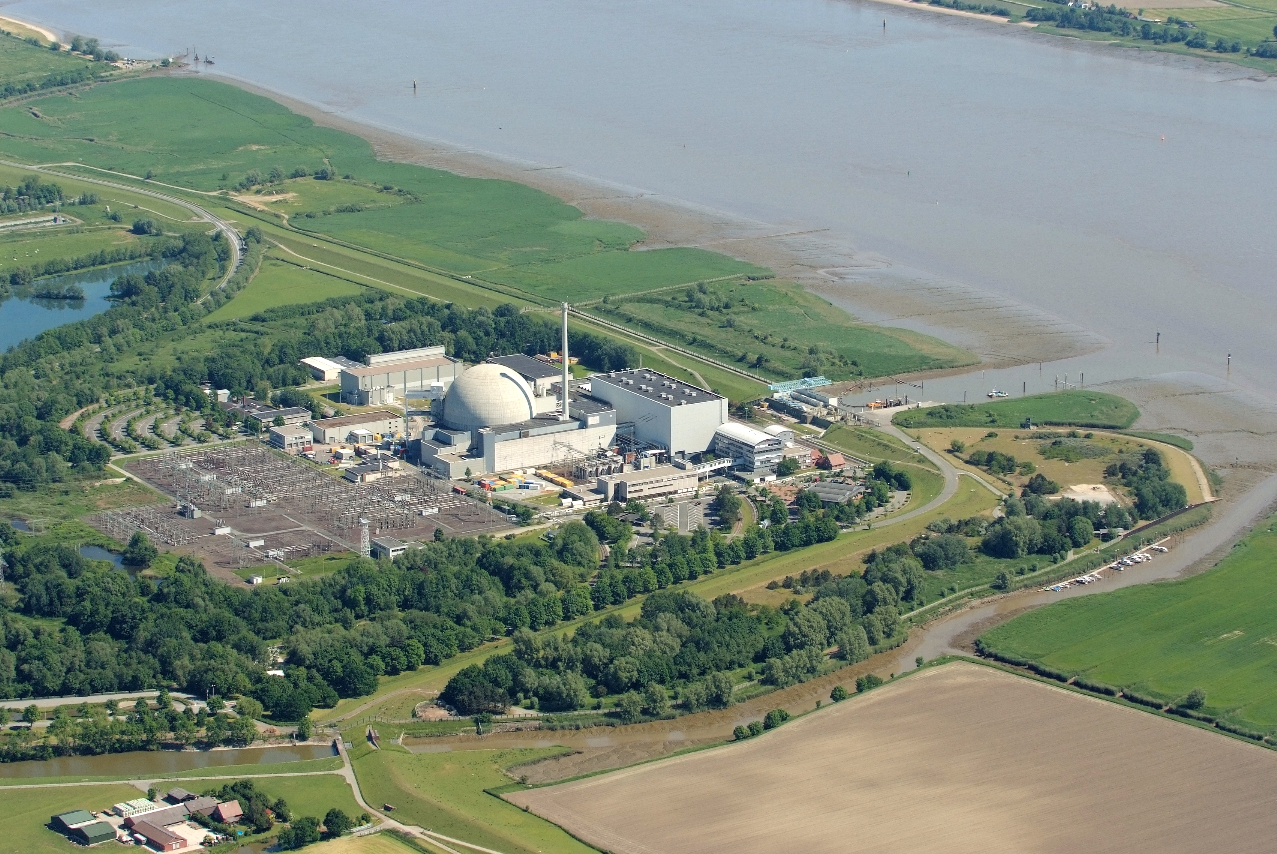 Umspannwerk und Kernkraftwerk Unterweser, Fotoflug vom Flugplatz Nordholz-Spieka über Cuxhaven und Wilhelmshaven